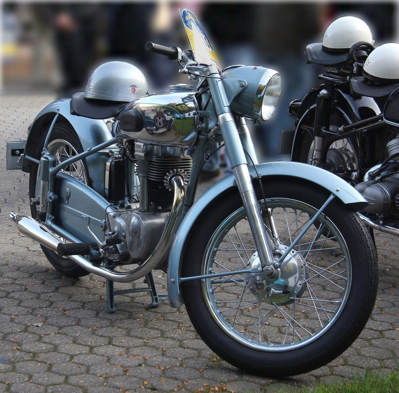 Horex Regina Sport bei der Moselschiefer-Classic des AC Mayen